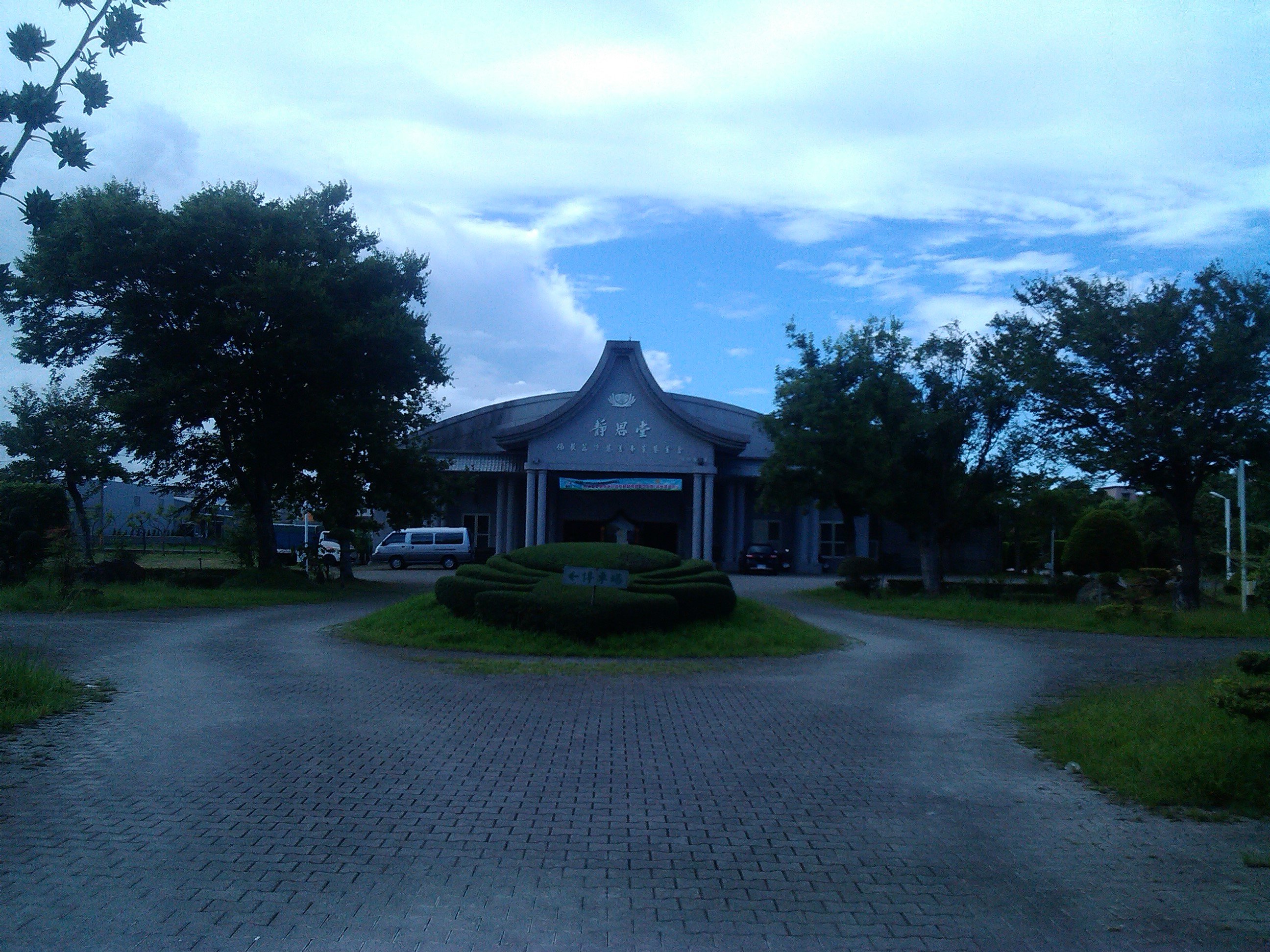 位於五結鄉五結路三段360號